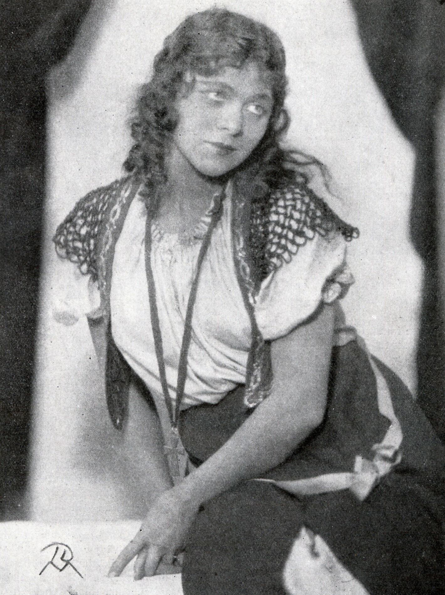 Helga Görlin (1900-1993) spelar titelrollen i Mignon (Foto i Scenen 1927).